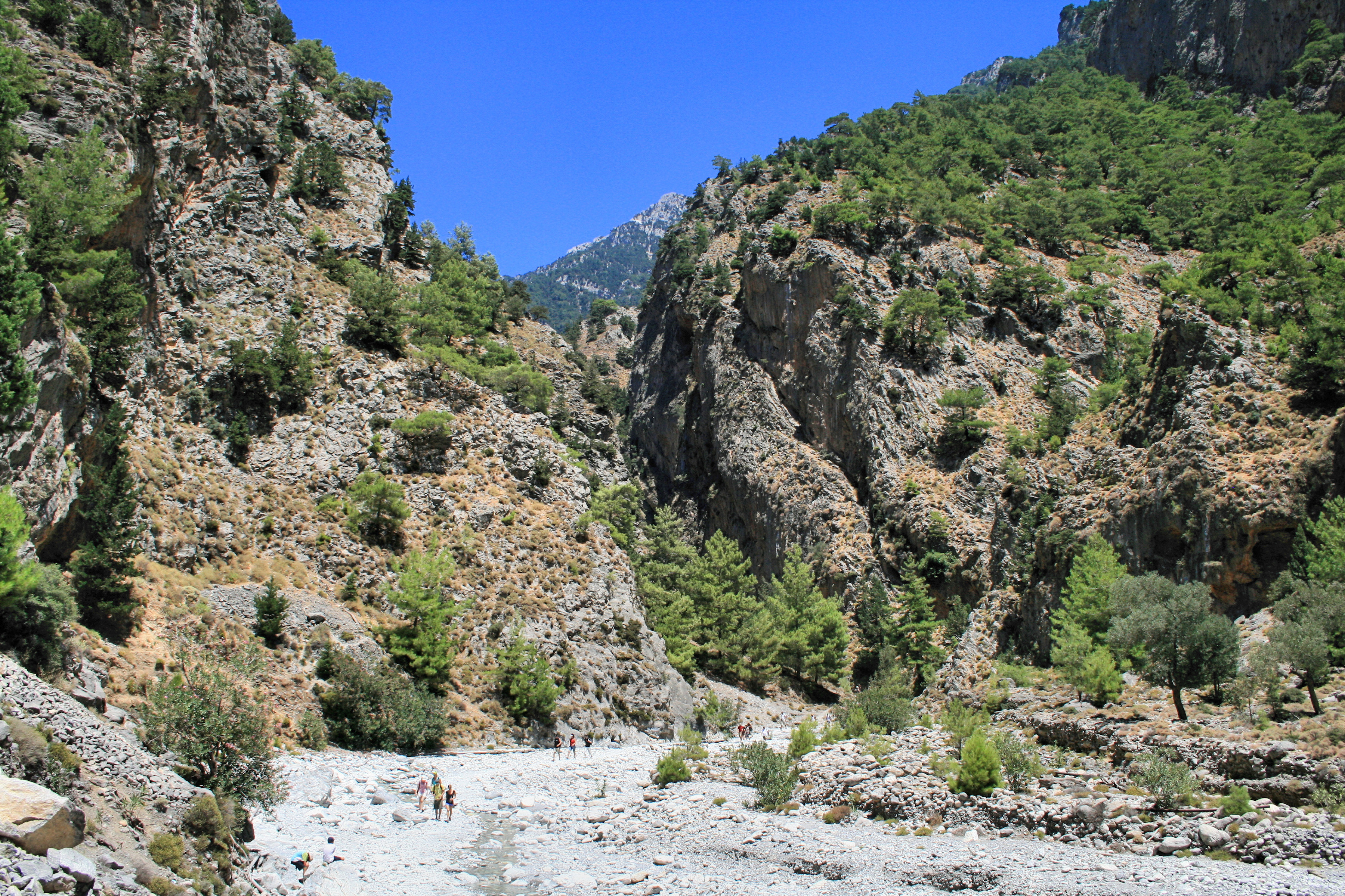 Wanderweg durch die Samaria-Schlucht auf der Insel Kreta / Nach dem letzten Felsentor öffnet sich die Schlucht in Richtung Libysches Meer